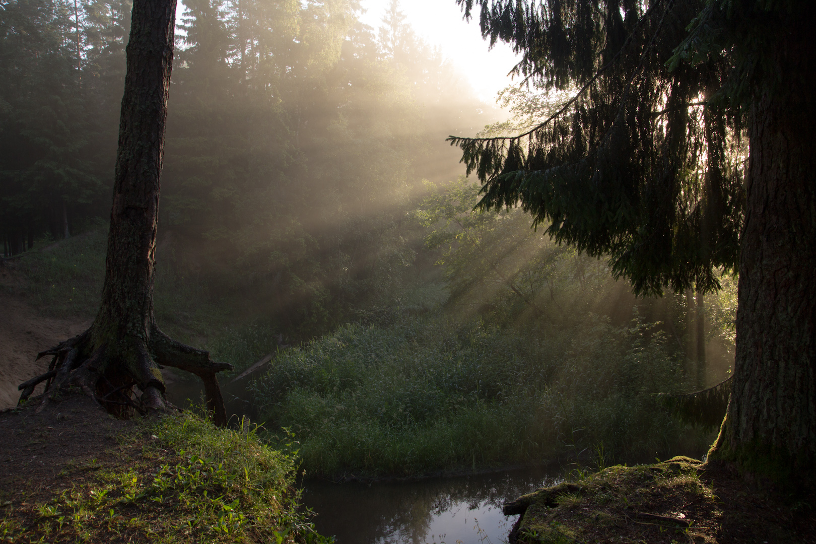 Bubių-Padubysio miškai (Dubysa)